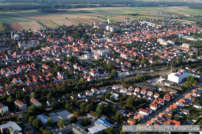 Luftbild aus SW.